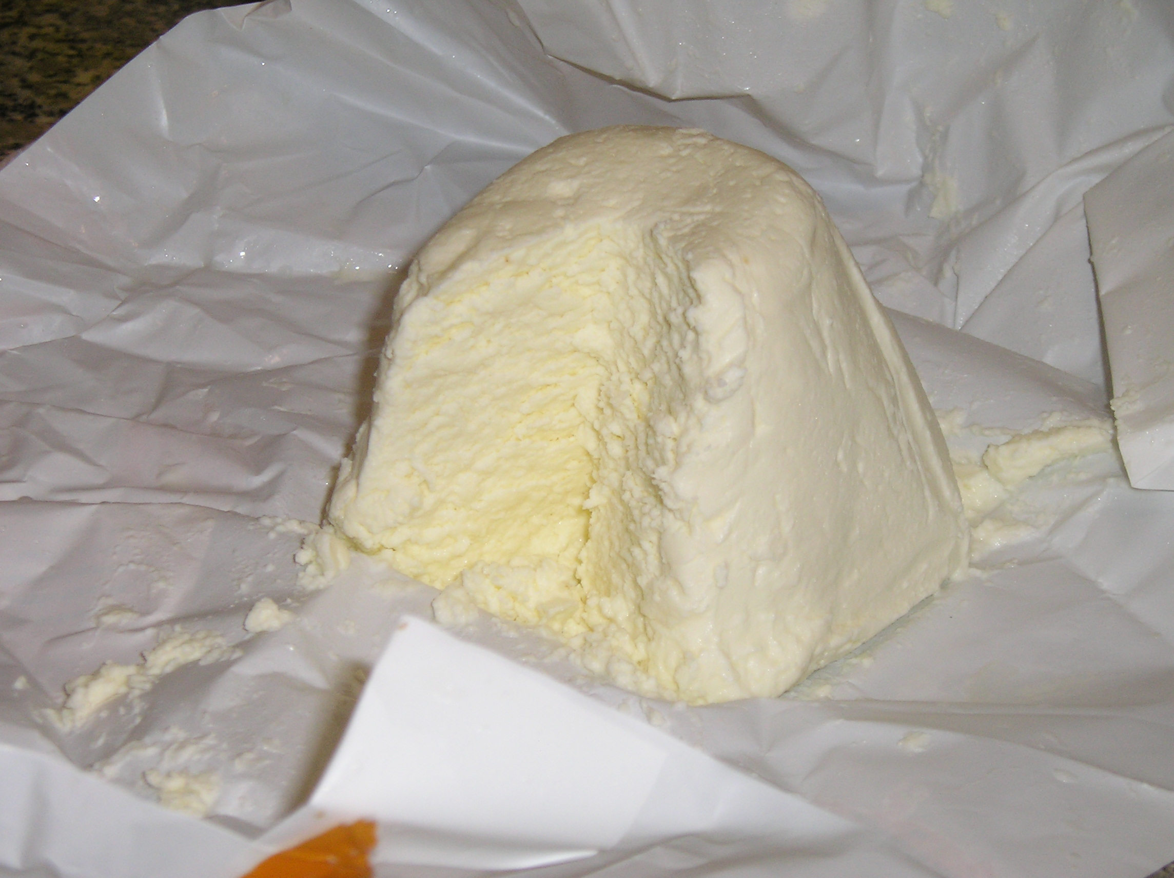 Queso asturiano Afuega'l pitu fresco elaborado con leche pasteurizada